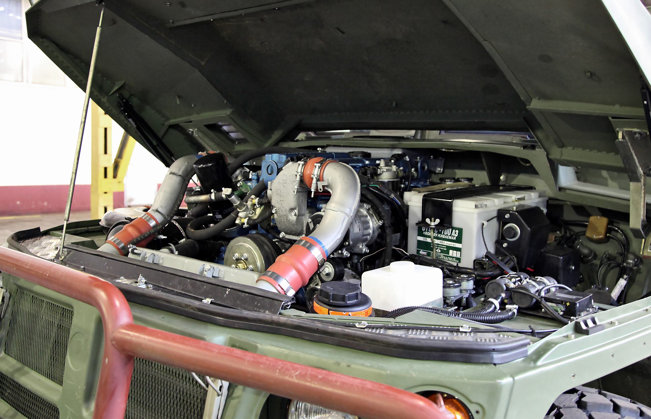 дизельный двигатель ЯМЗ-534 с турбонаддувом и мощностью 215 л.с. (YaMZ-534 diesel engine with 215 hp)